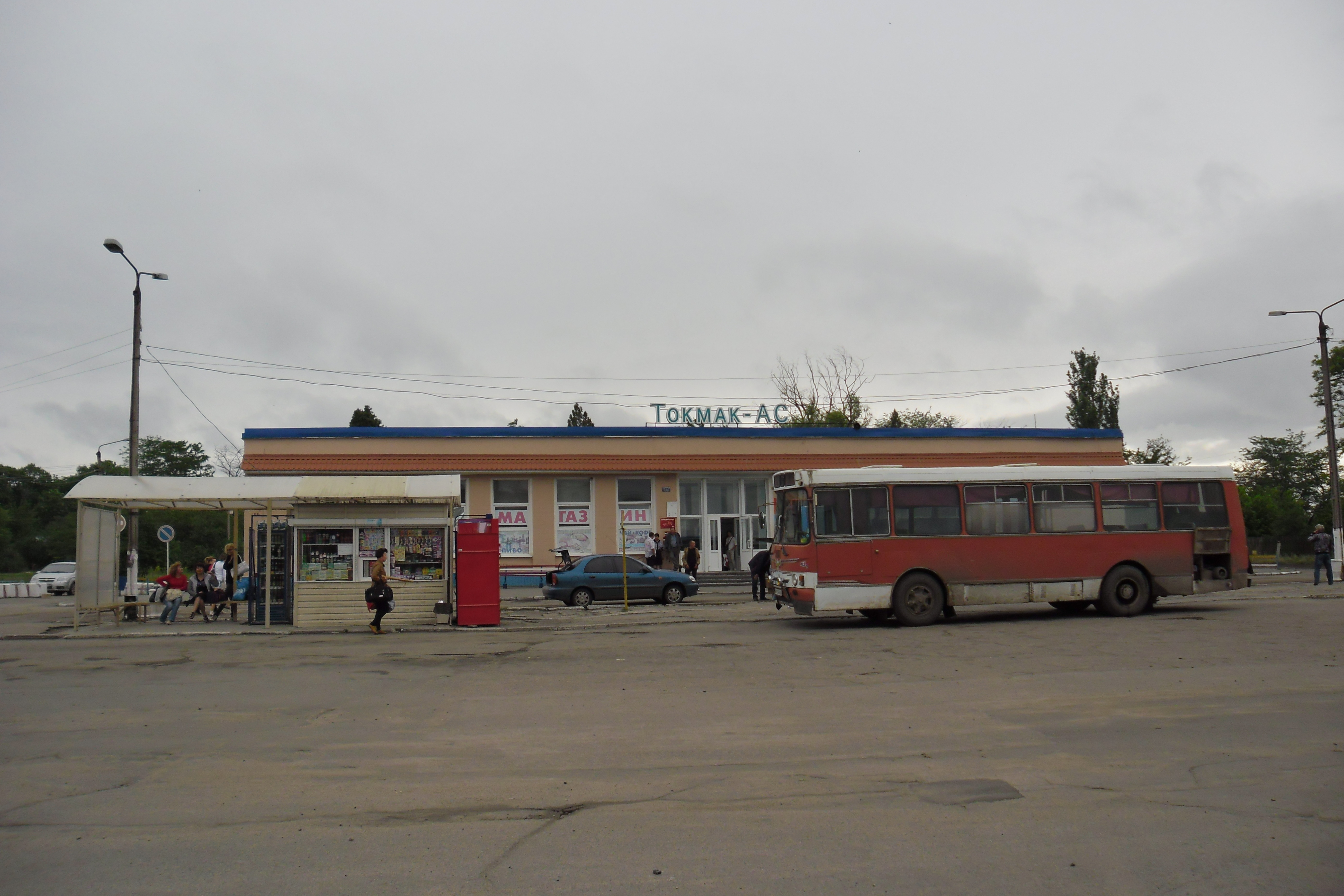 Токмак